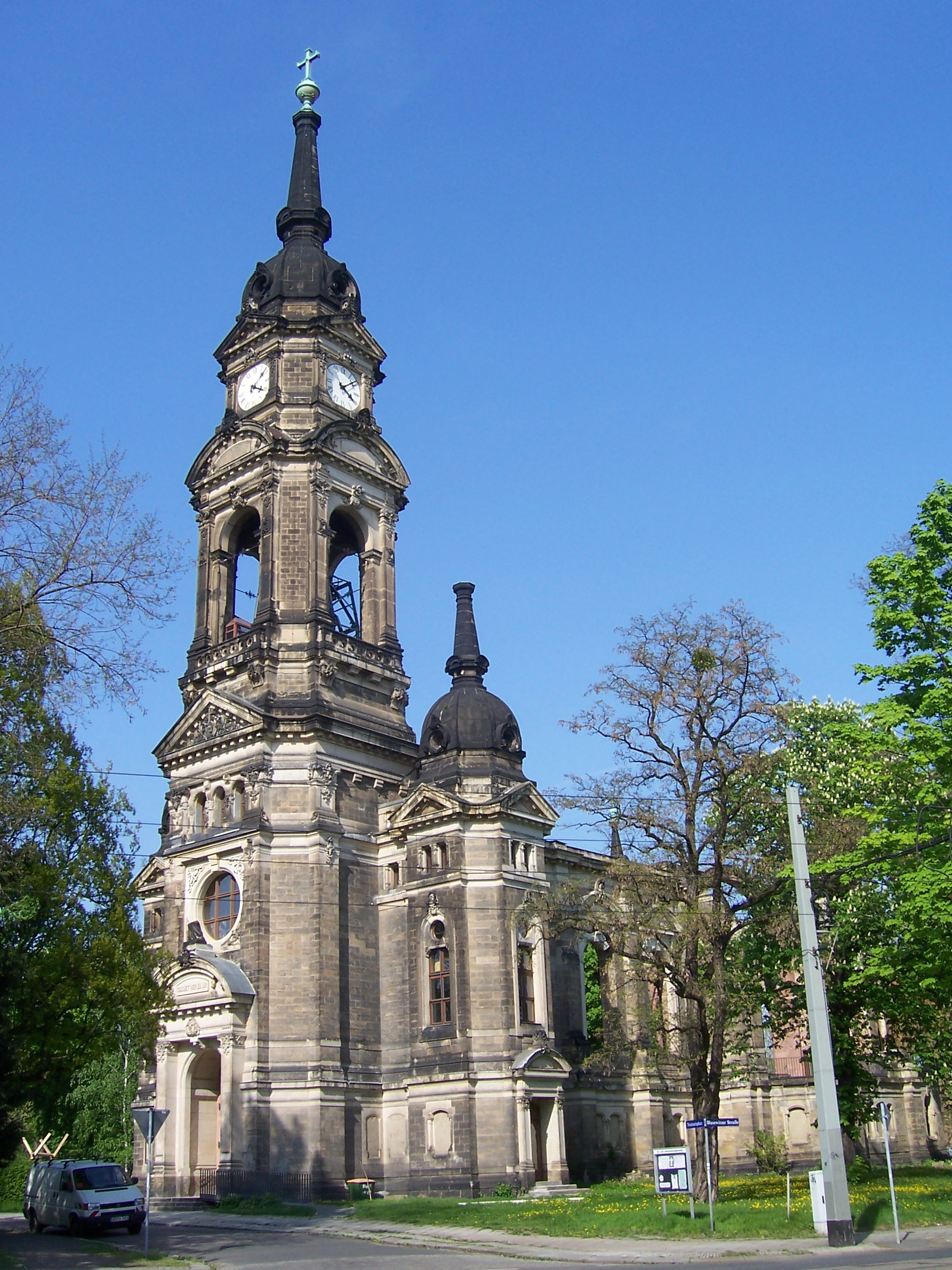 Trinitatiskirchruine in Dresden-Johannstadt.